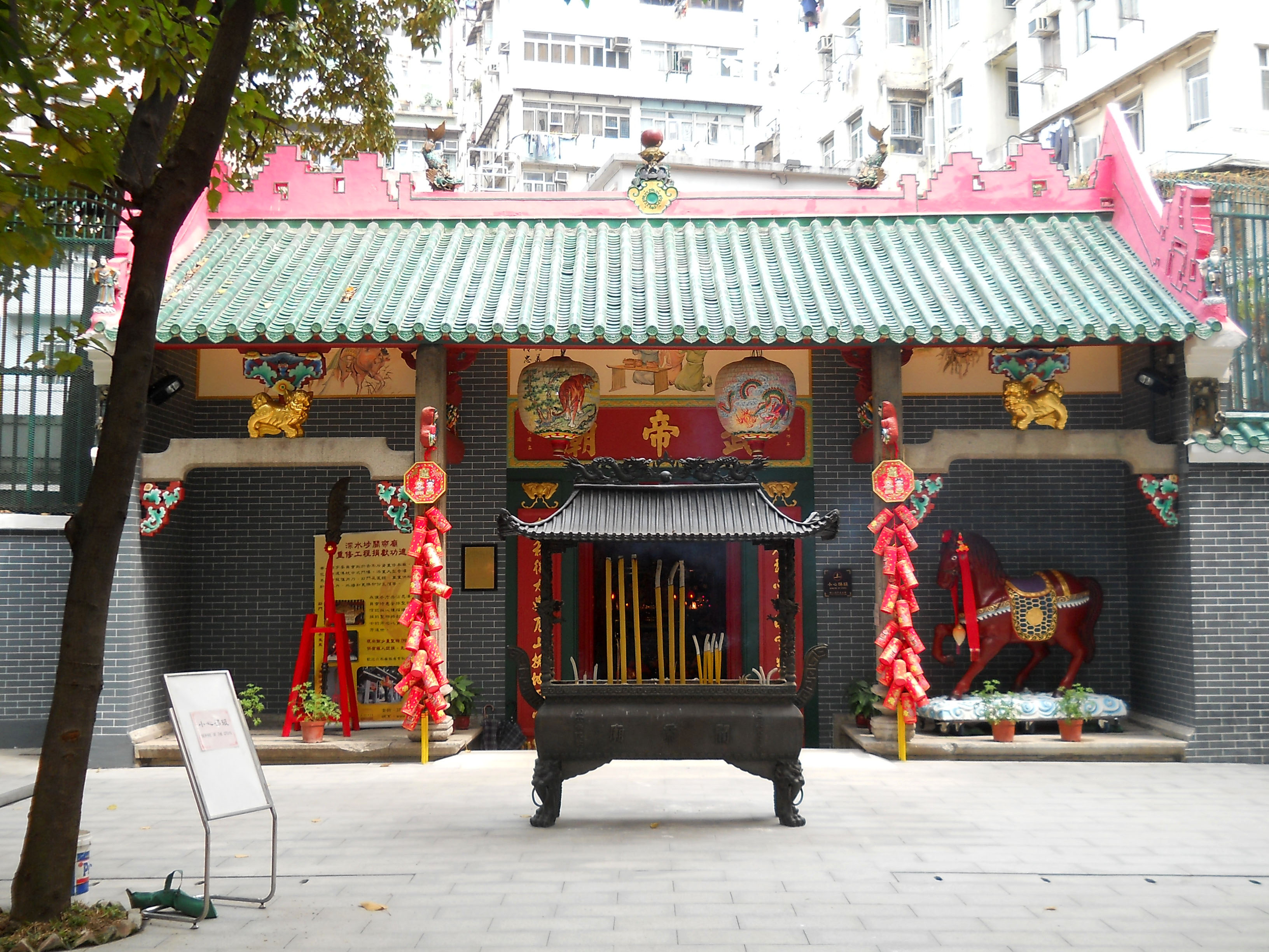 中文（香港）: 深水埗關帝廟